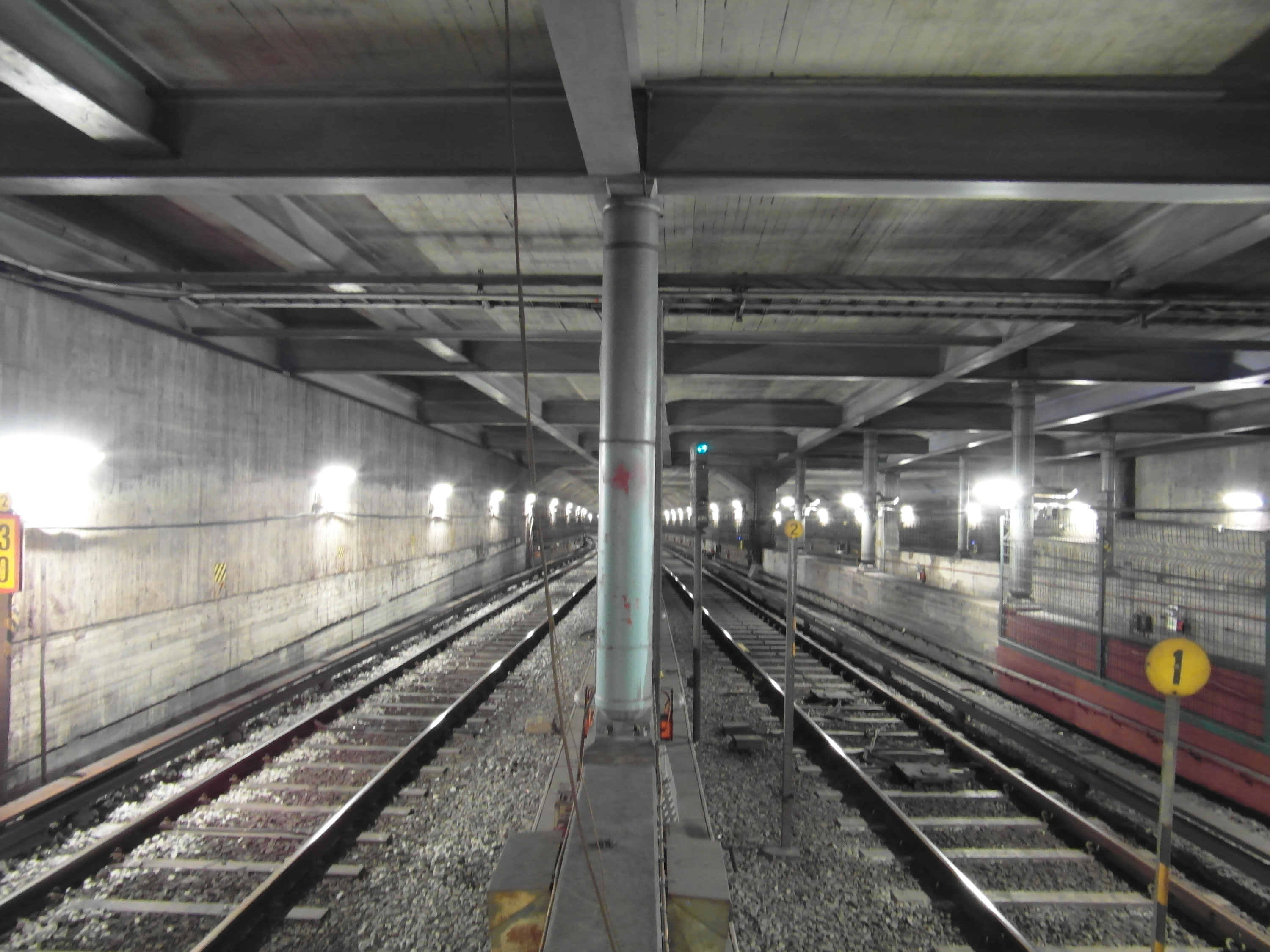 Röda linjen - T13 - T14 Gröna linjen - T17 - T18 - T19